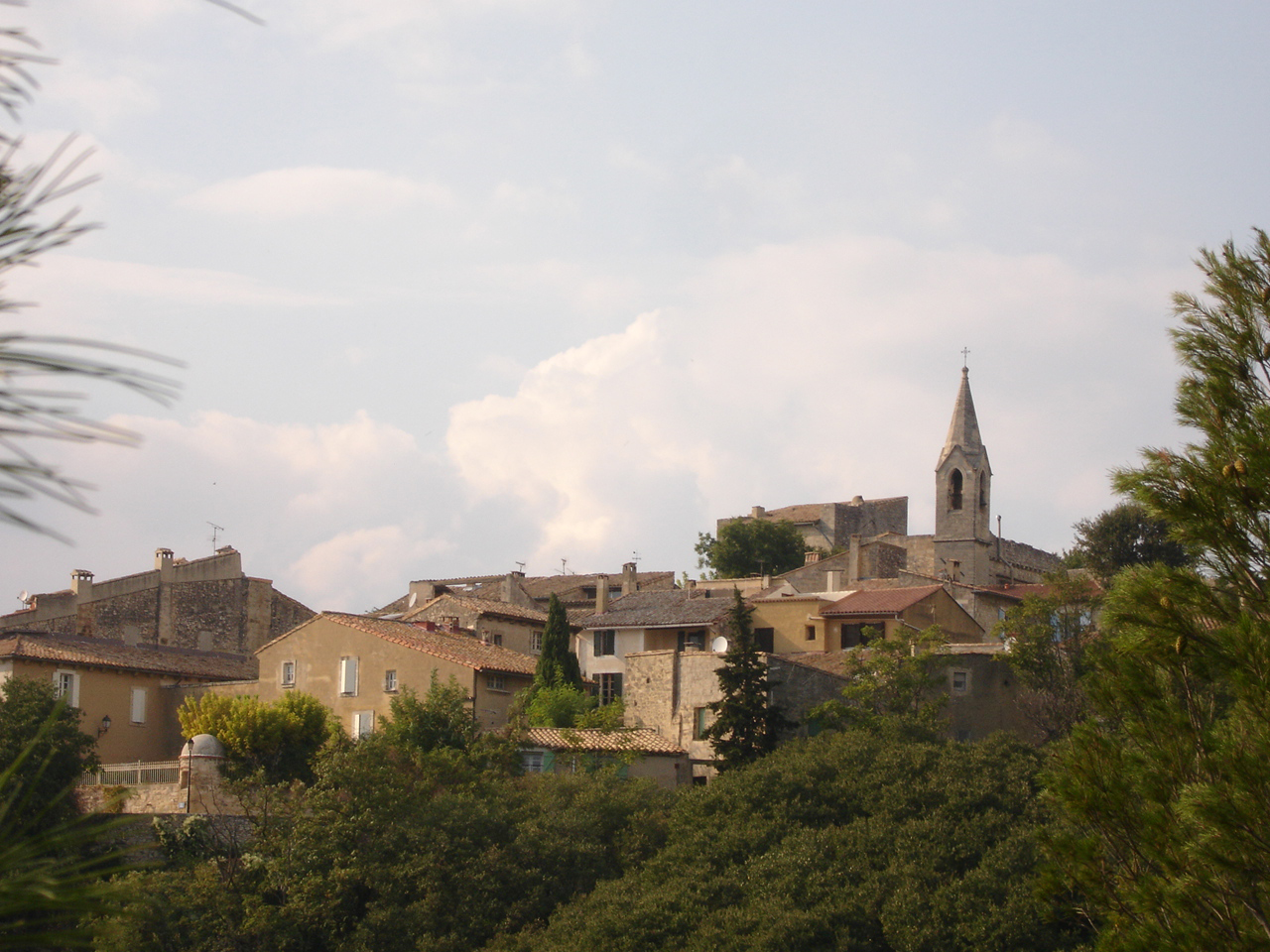 Vue générale du village des Angles (30)